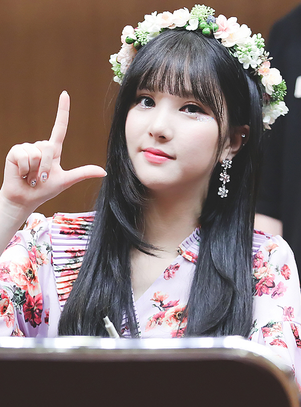 180511 당산 팬싸인회